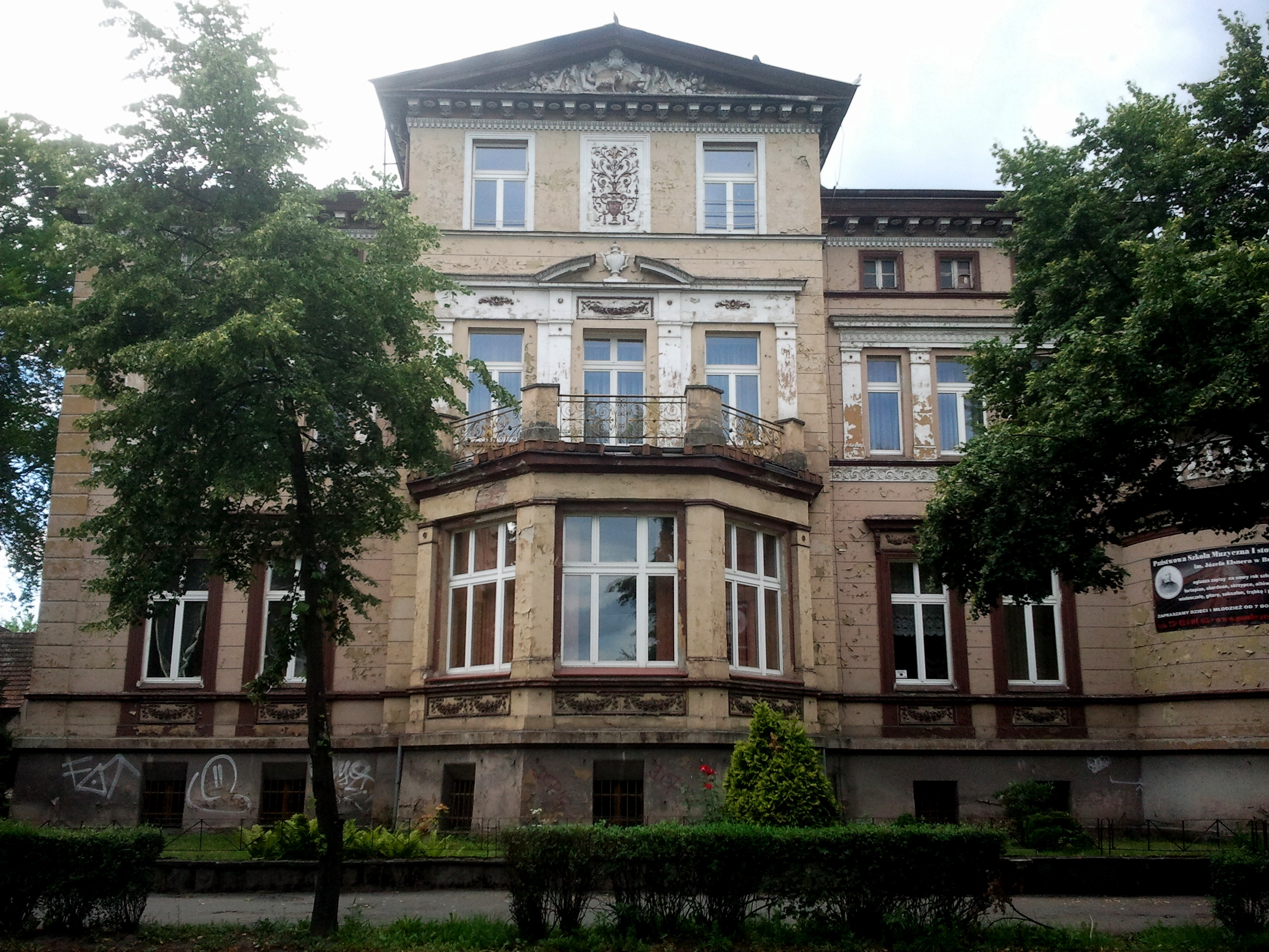 Brzeg, ul. Piastowska 18 - dom, obecnie Państwowa Szkoła Muzyczna (zabytek nr 2217/90 z 10.05.1990)